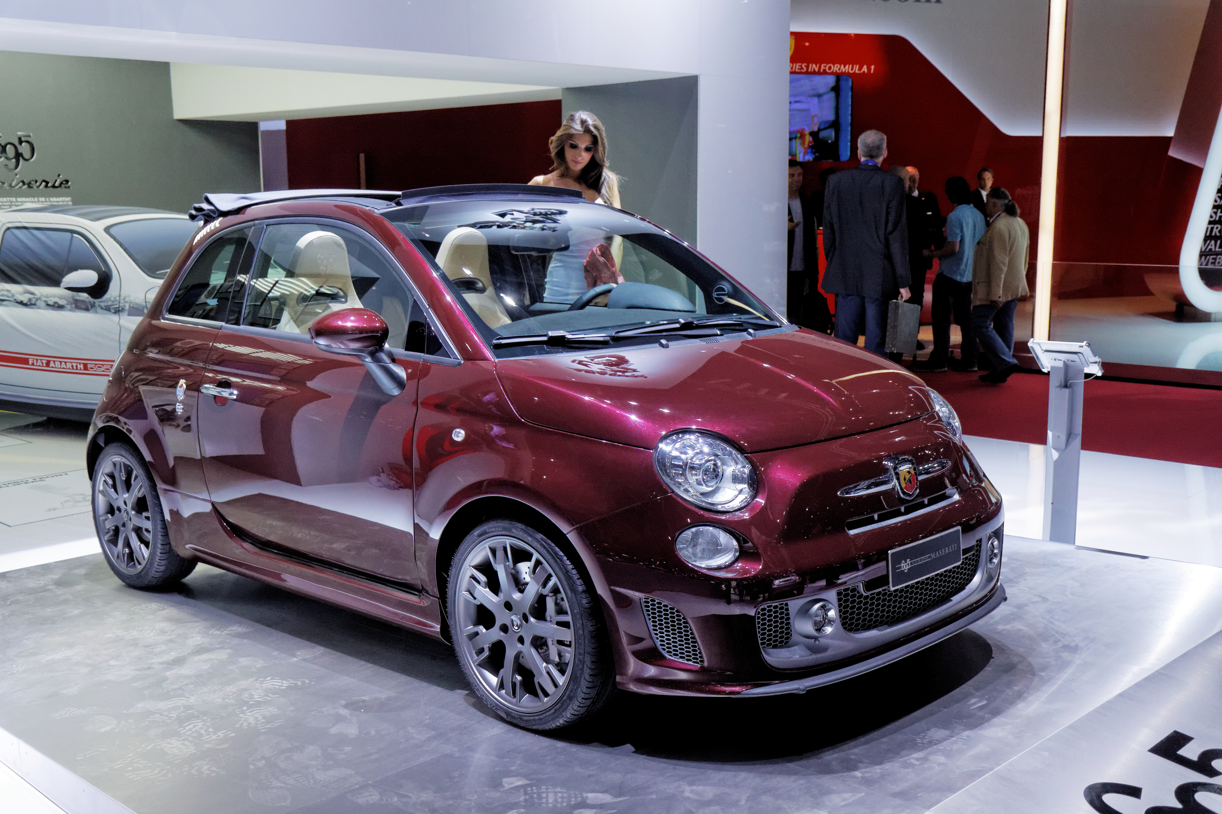 Une Fiat Abarth 695 Edizione Maserati présentée lors du Mondial de l'Automobile de Paris 2012.